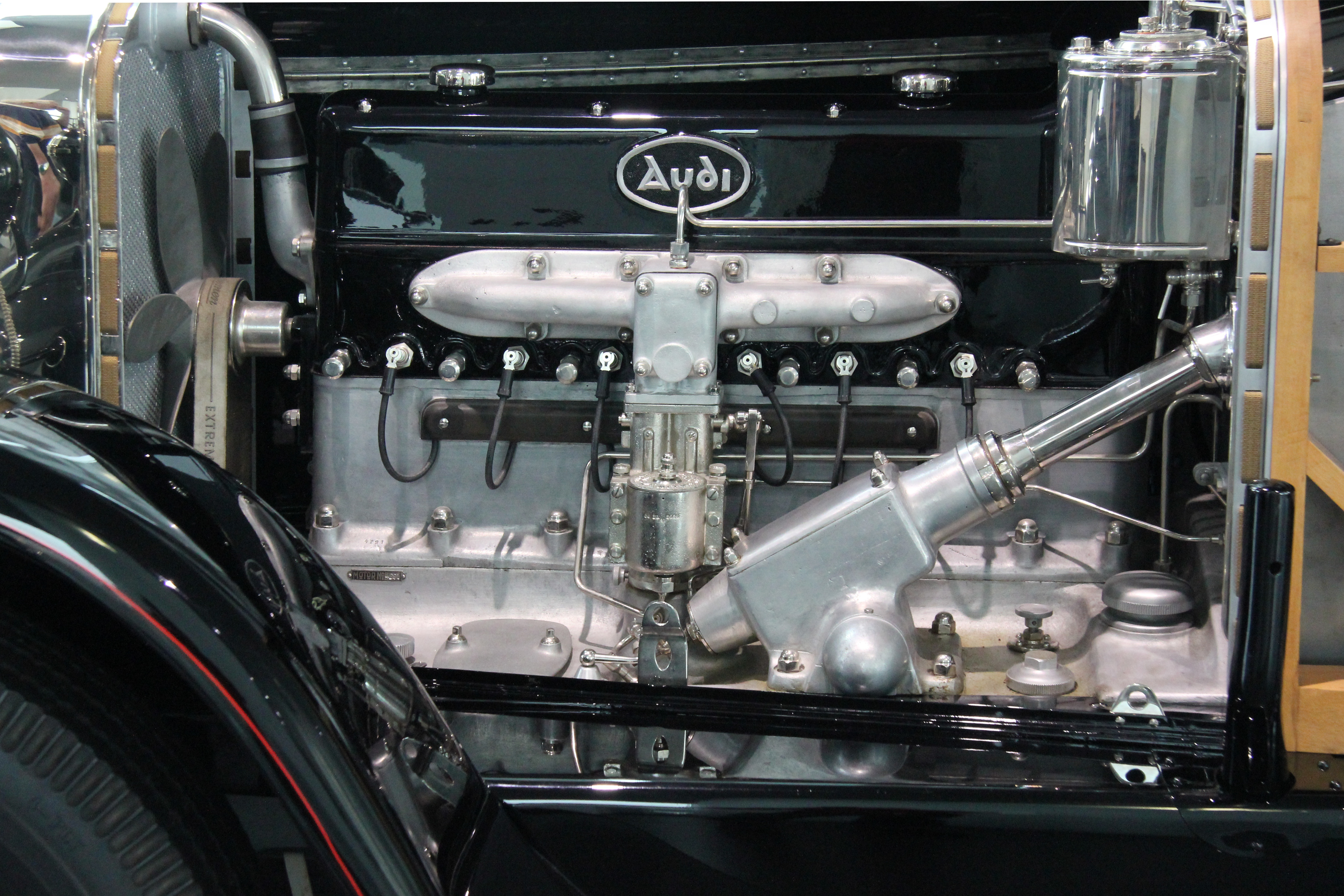 Audi 18, Typ M, Baujahr 1925. Sechszylinderreihenmotor, 4660 cm³, über Königswelle angetriebene obenliegende Nockenwelle, 70 PS bei 2500/min; Höchstgeschwindigkeit 120 km/h. Verbrauch: 22 bis 25 l/100 km. 228 Stück wurden von 1925 bis 1928 gebaut. Preis: 22.300 RM